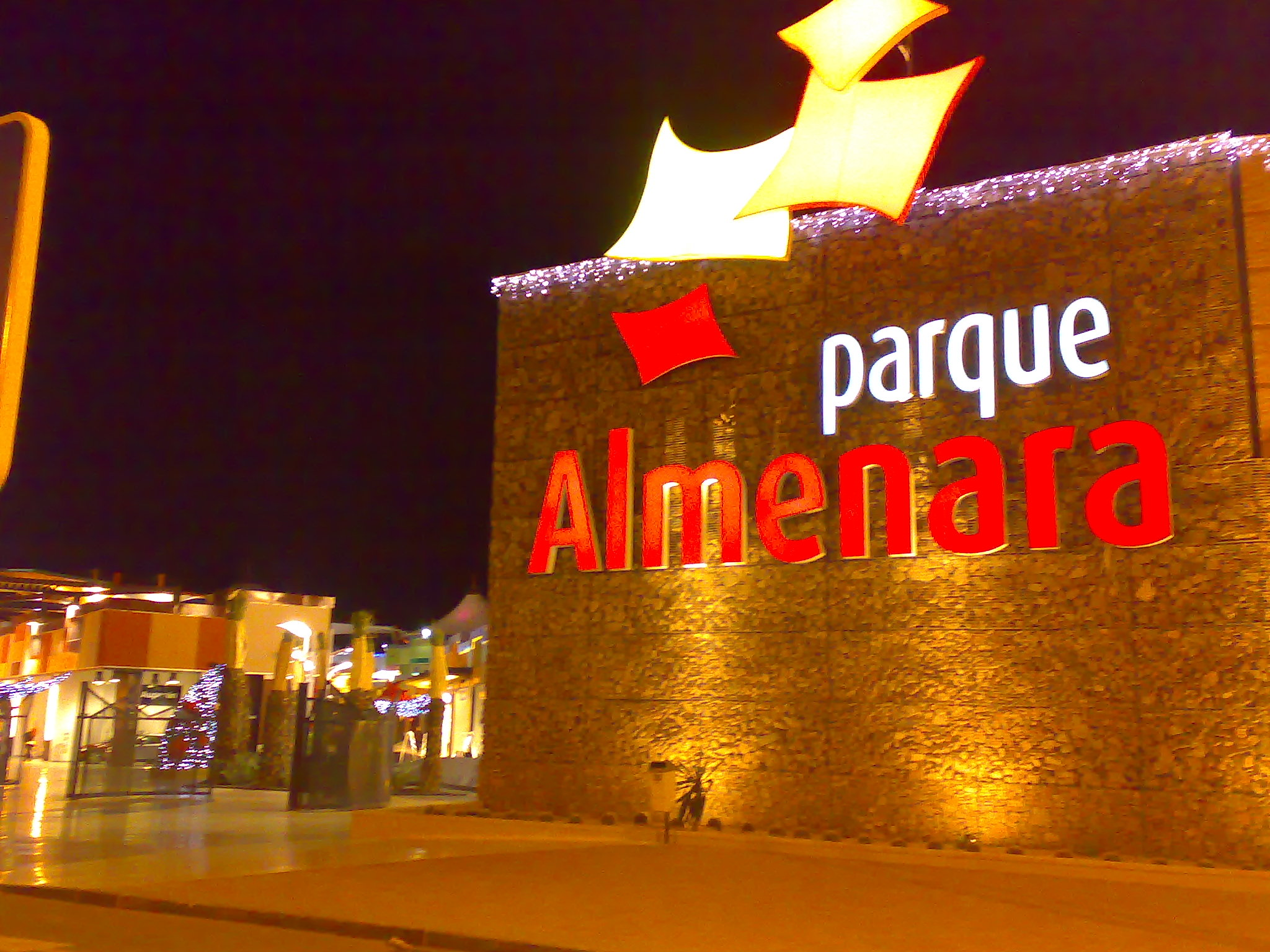 Letrero de la entrada por la noche del centro comercial Parque Almenara.